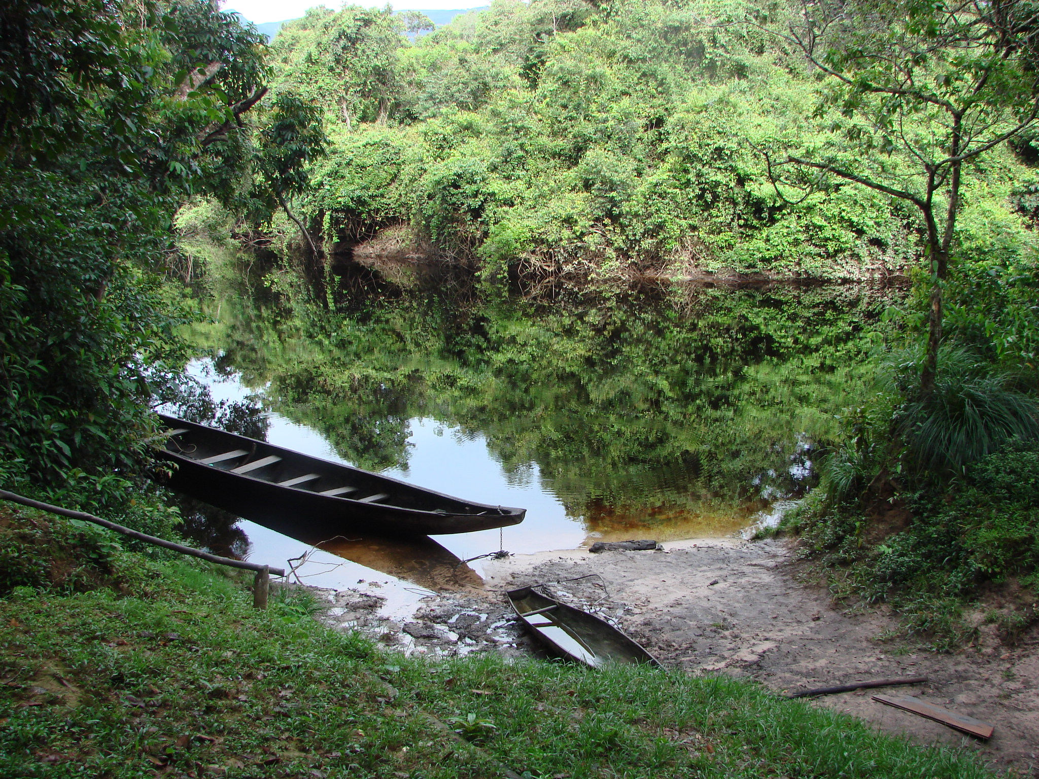 PAISAJE EN CAMPAMENTO VACACIONAL YUTAJE, ESTADO AMAZONAS